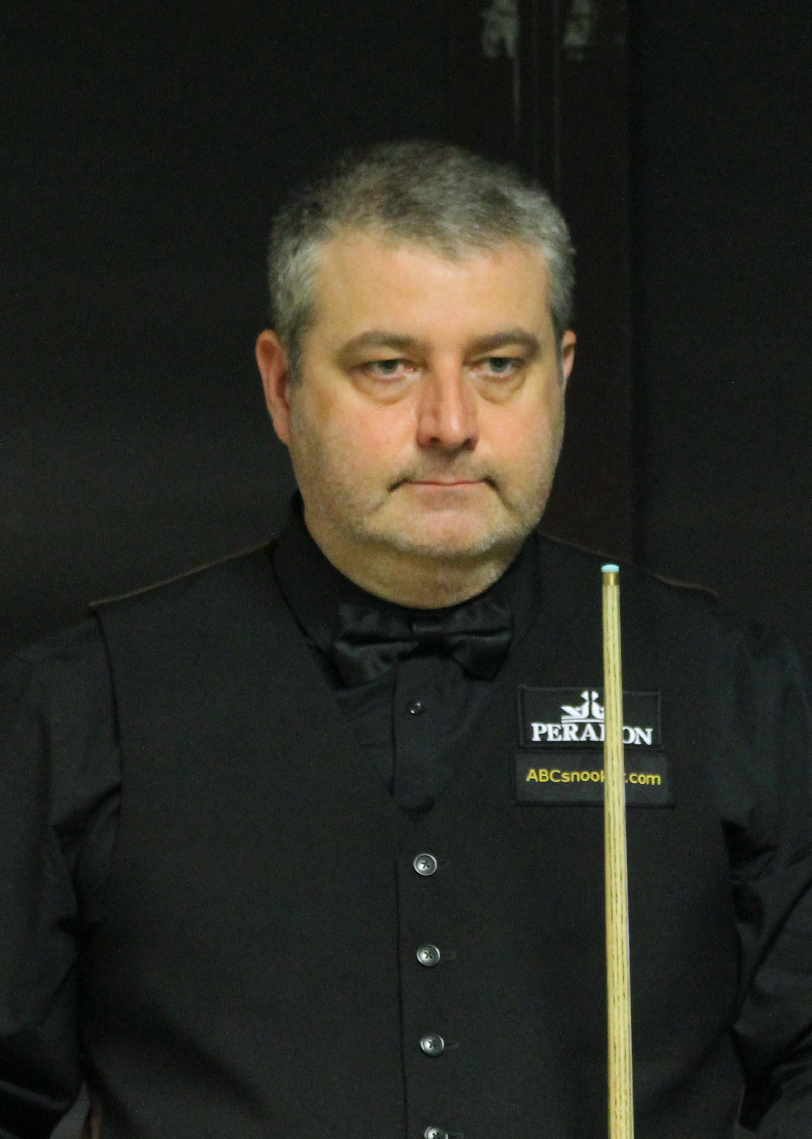 Rod Lawler beim Paul Hunter Classic 2016